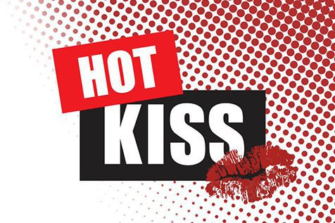 Program Infotaiment Indosiar